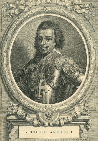 Vittorio Amedeo I di Savoia (1587-1637)